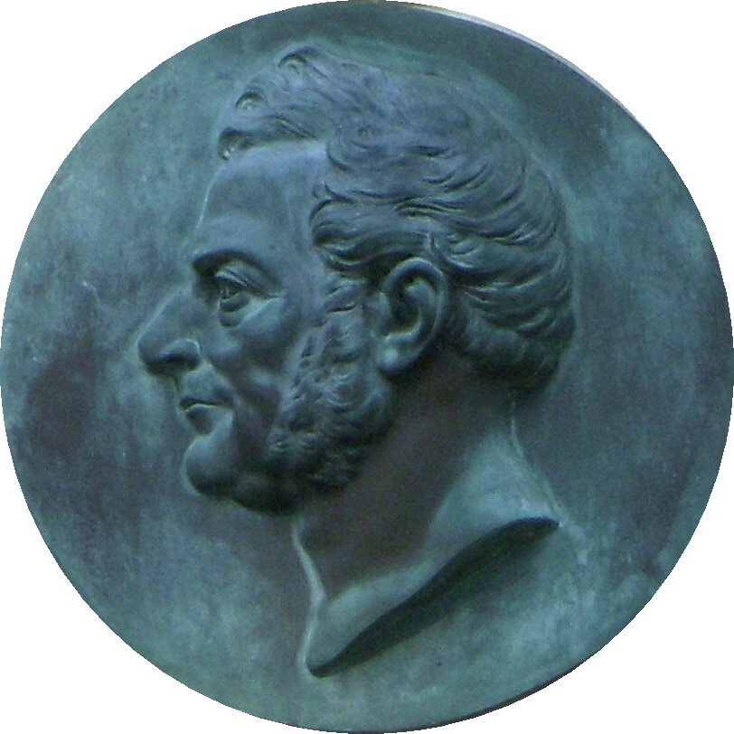 Elias Sehlstedt, medaljong på hans bostadshus på Djurgården i Stockholm